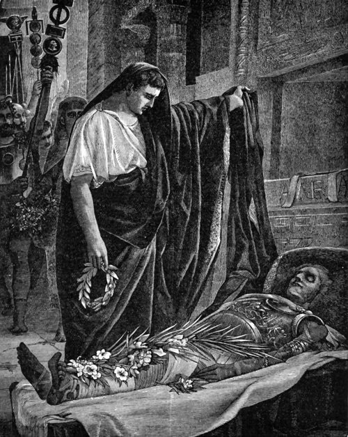 Augusto visita la tomba di Alessandro Magno